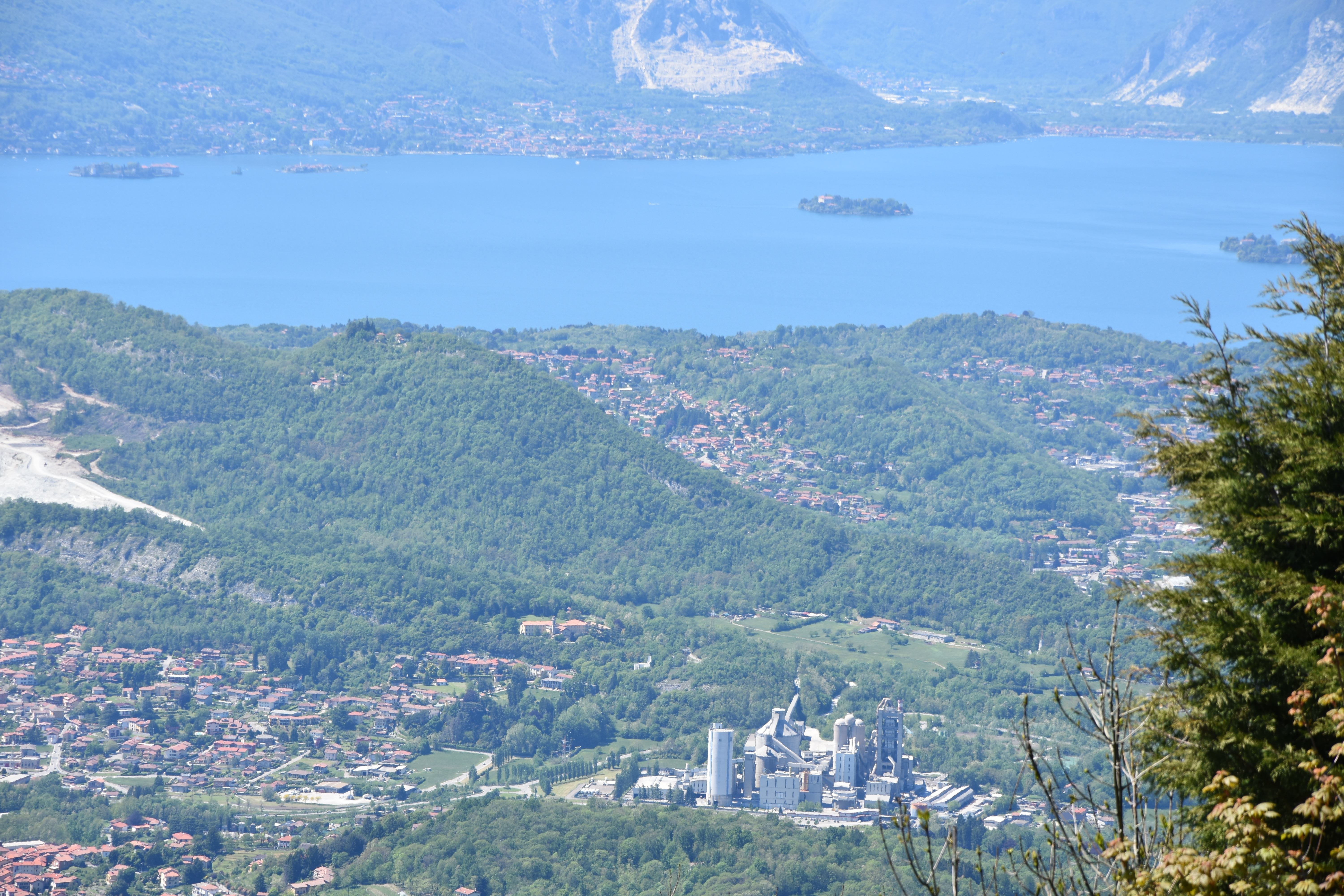 Vista verso ovest dal forte di Orino. In basso si nota il cementificio Colacem di Caravate. In alto il Lago Maggiore con le Isole Borromee